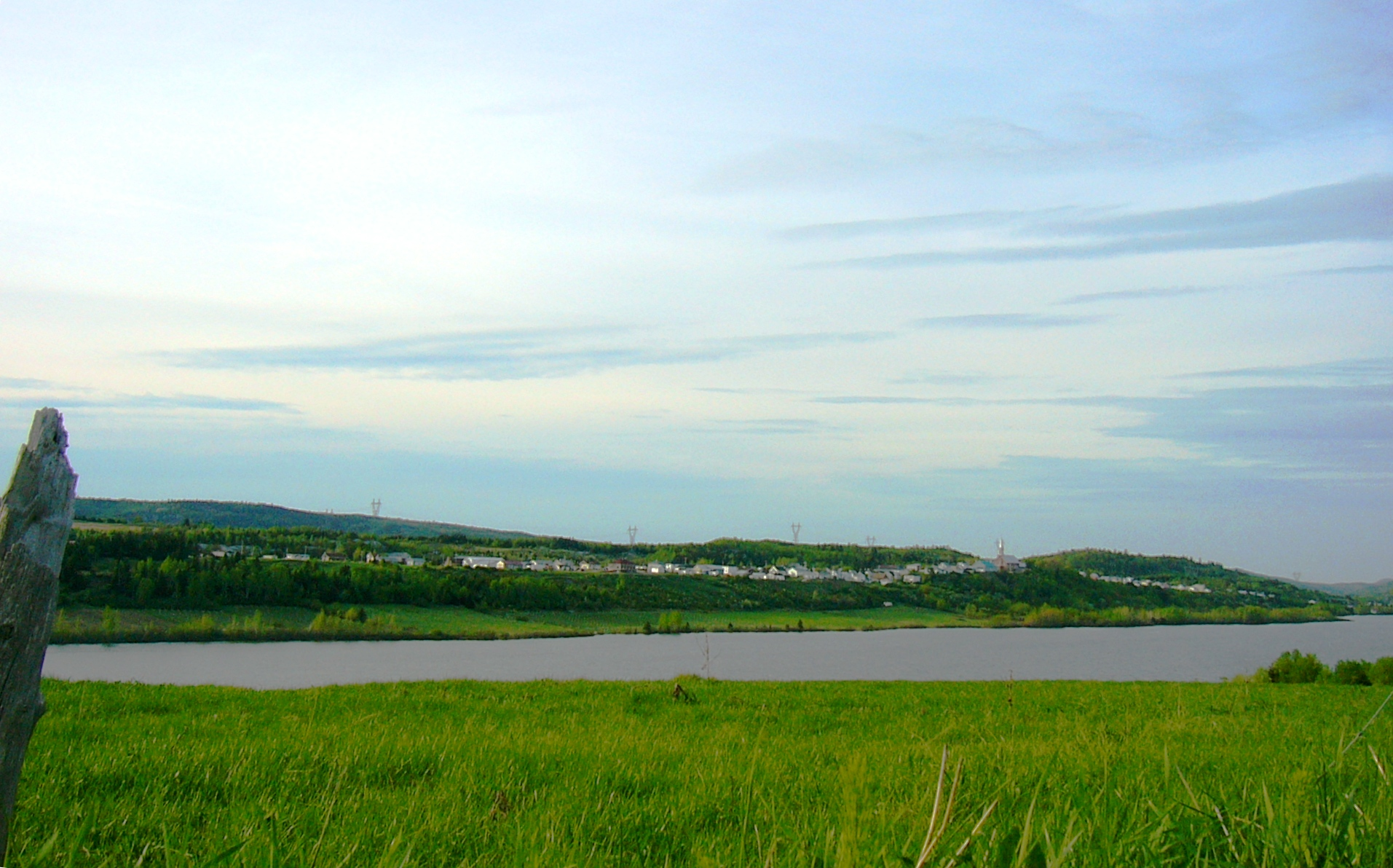 Le village de Saint-Mathieu-de-Rioux. La photographie est prise de la berge sud du Petit-Lac-Saint-Mathieu que le village surplombe.